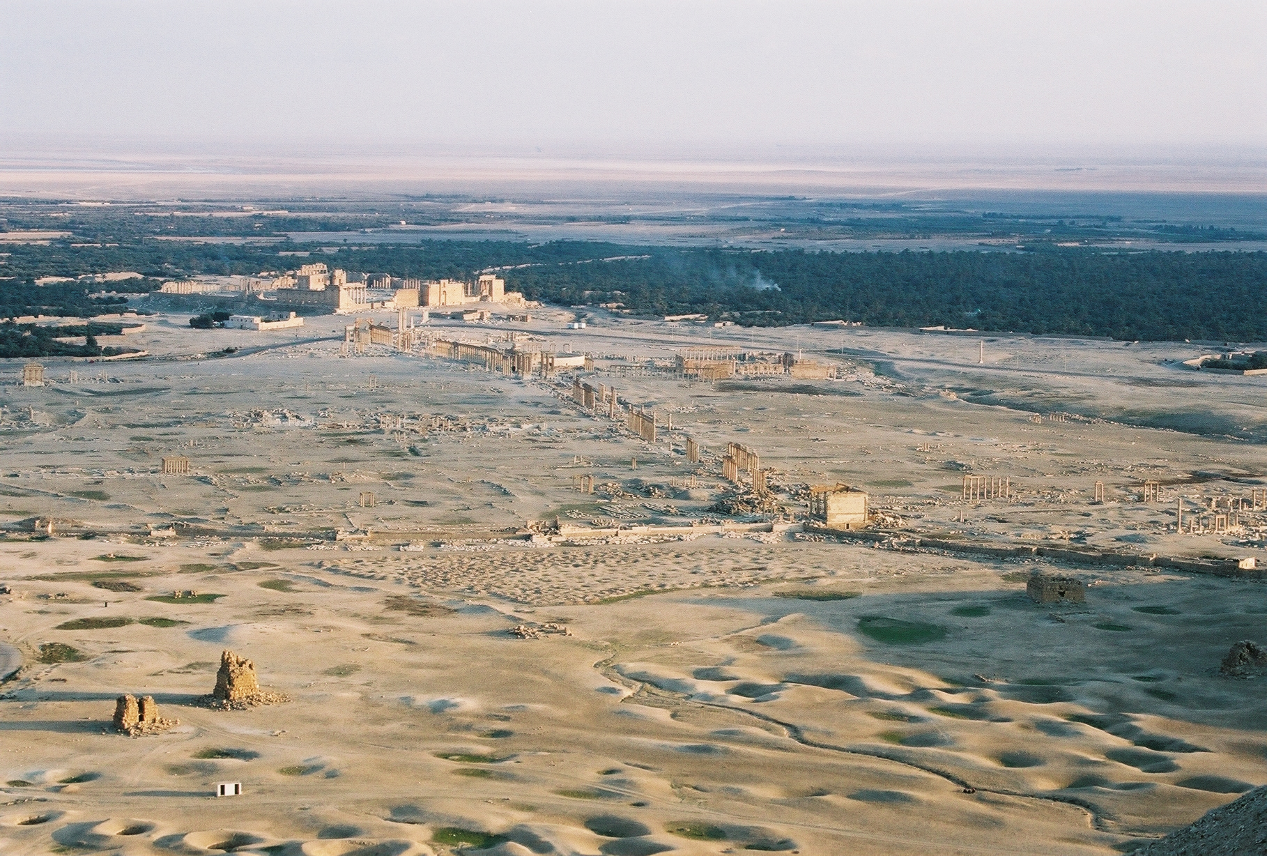 Palmyre, Syrie - vue générale du site (depuis le château arabe). Dans le fond, le désert syrien. Au centre, l'oasis. Un peu sur la gauche, le temple de Bel, duquel part la grande colonnade, qui va jusqu'au tetrapylon. Au premier plan, à gauche, deux ruines de tombeaux - tours du premier siécle après JC). Photo prise le soir vers 17h30, début février.